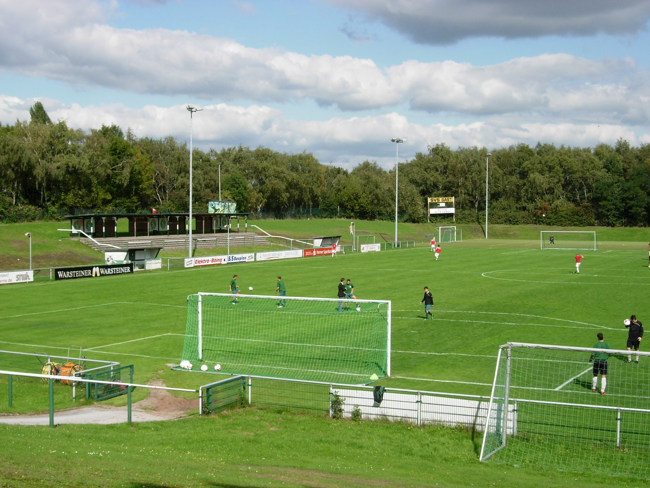 heutiges Stadion Am Holzplatz des SV Sodingen